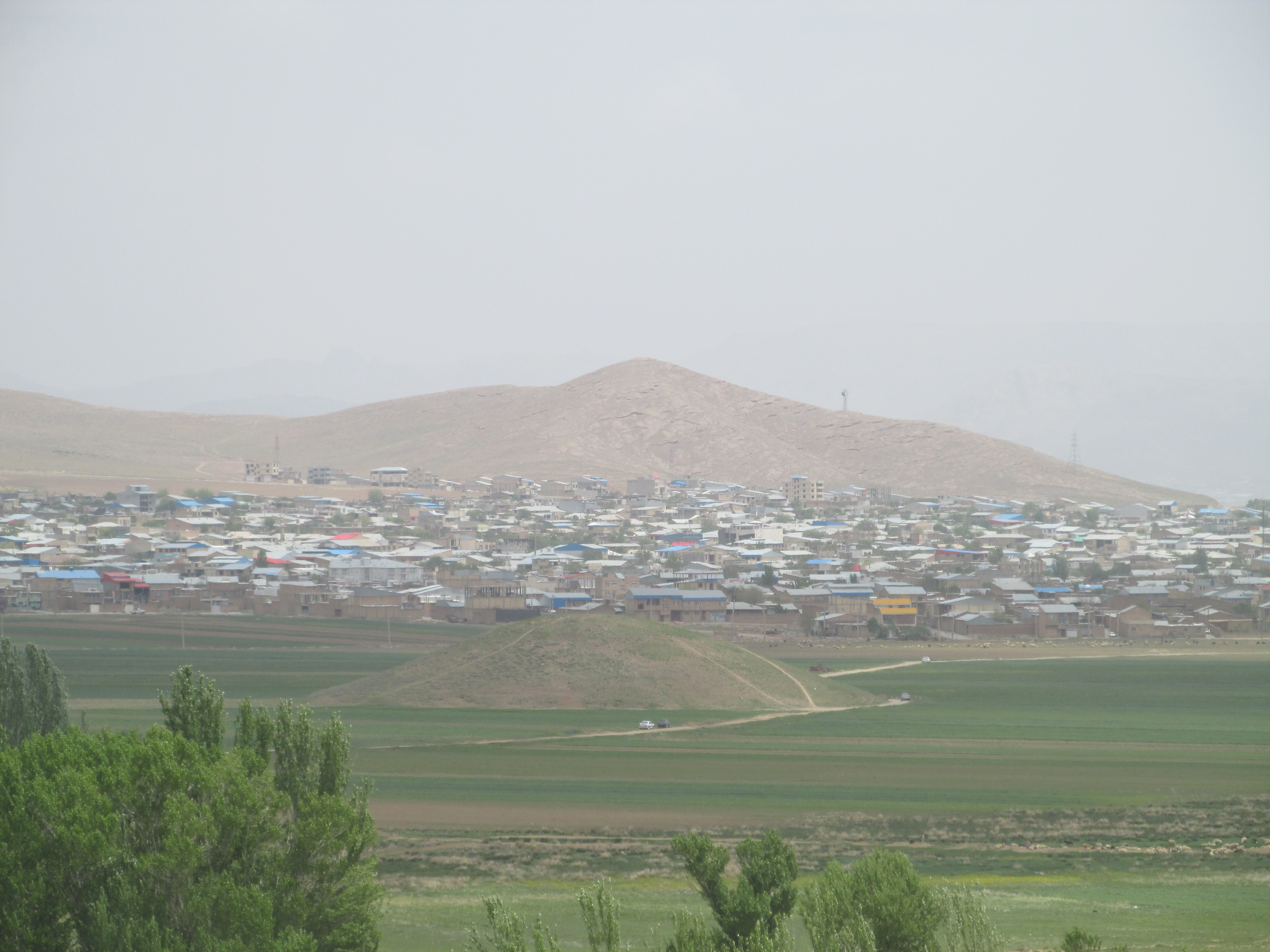 تپه اسکندری هفشجان اولین و بزرگ ترین اثر ملی تاریخی استان چهارمحال و بختیاری